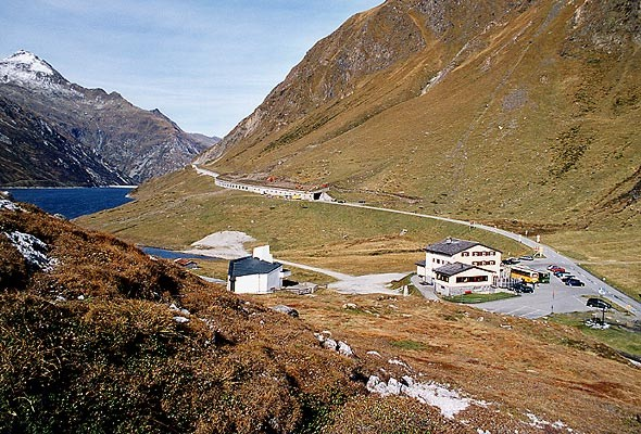 Passo del Lucomagno presa da Wiki tedesca :de:Bild:Lukmanierpass.jpg image of Benutzer:Ikiwaner